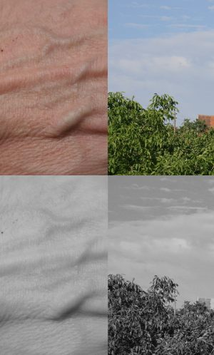 Umsetzung von Farben in ein Schwarz-Weiss-Bild, digital simuliert (Bildbearbeitung gimp, Filter color2bw). Nur roter Kanal, entspricht simulierten Rotfilter.